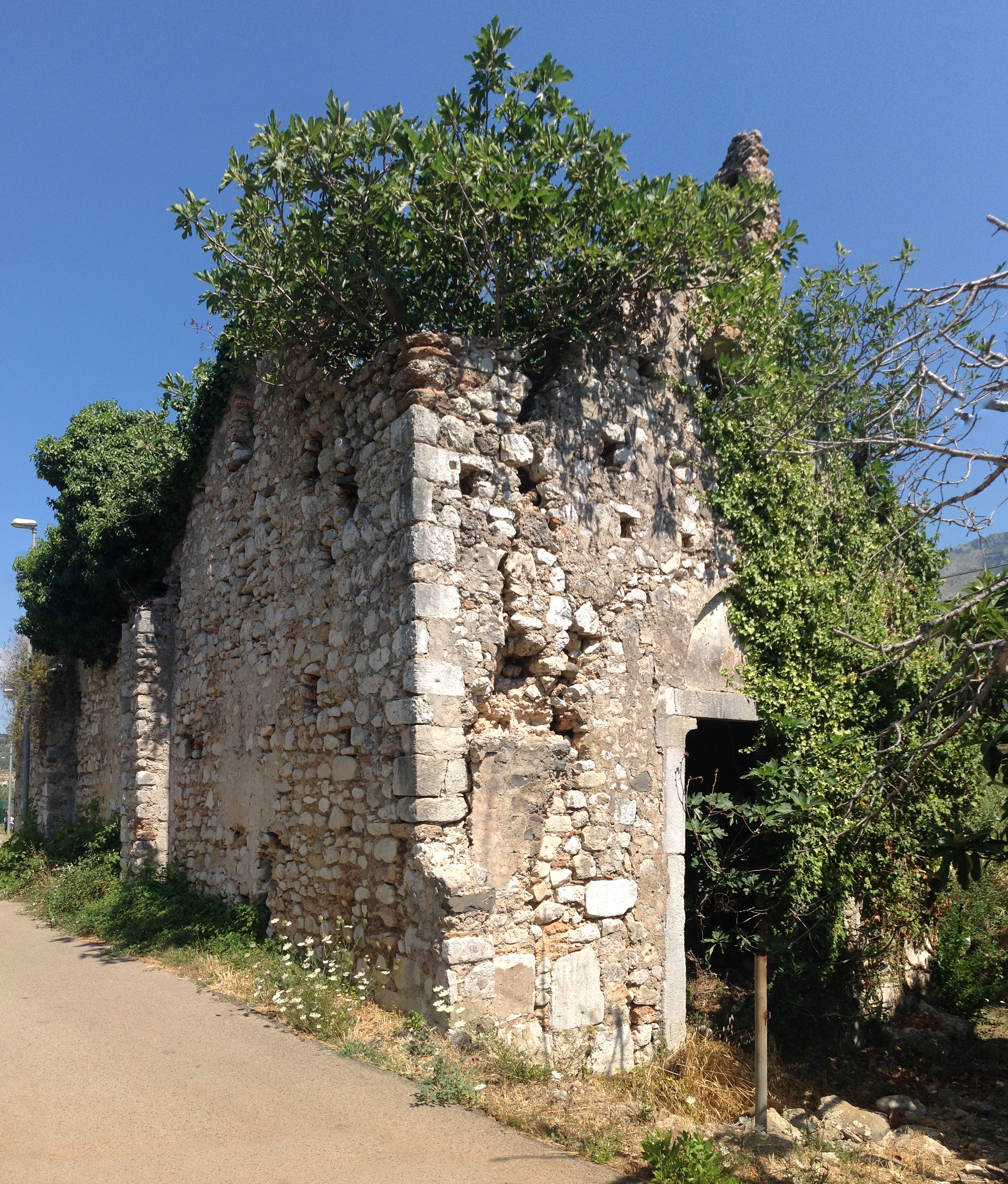 Esterno.